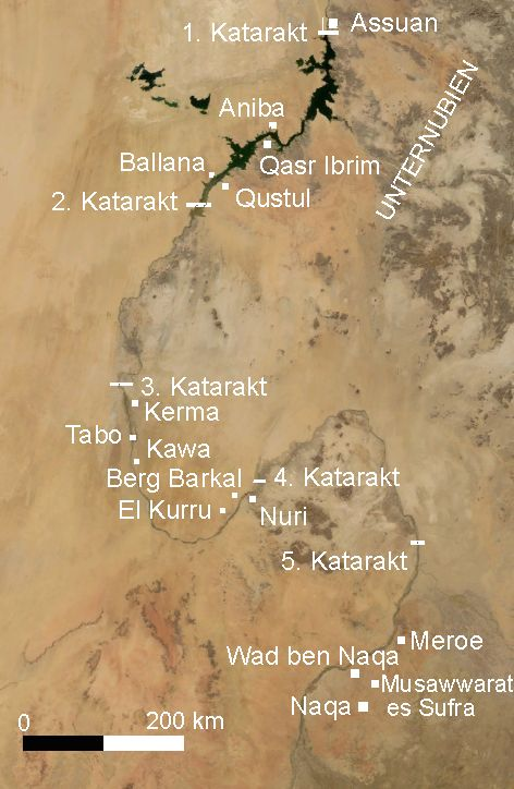 Summary Bildbeschreibung: Nubien in der Antike (Karte) Quelle: erstellt mit Nasa World Wind Fotograf/Zeichner: umgearbeitet von Udimu Datum: 15.04.2006 11:53, 15. Apr 2006 Udimu 472 x 724 (1035834 Byte) (* Bildbeschreibung: Nubien in der Antike (Karte) * Quelle: erstellt mit Nasa World Wind * Fotograf/Zeichner: umgearbeitet von Udimu * Datum: 15.04.2006)